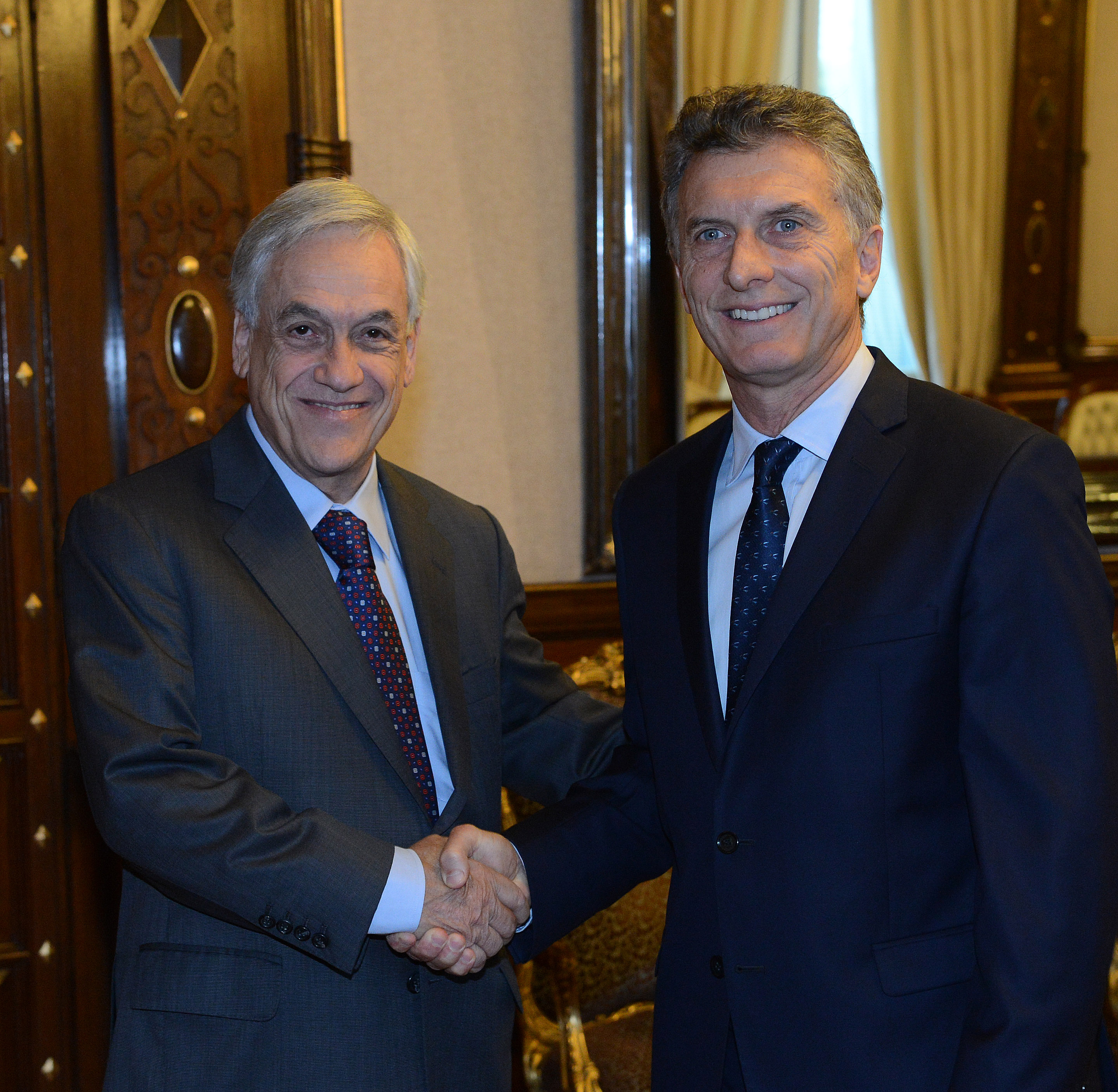 El presidente Mauricio Macri recibió esta tarde en Casa de Gobierno al ex presidente chileno, Sebastián Piñera, y al secretario general de la Internacional Socialista, Luis Ayala. Macri realiza, desde los primeros días de diciembre, reuniones con los más importantes políticos de Chile. Una de las primeras visitas que Macri realizó a mandatarios sudamericanos, días después de haber ganado las elecciones, fue a la presidenta Michelle Bachelet, con quien se reunió en la Casa de la Moneda. Posteriormente, recibió en la Casa Rosada a Ricardo Lagos. ex presidente trasandino y líder del Partido por la Democracia. Piñera, representa a Renovación Nacional, y Luis Ayala, también chileno, es el titular de la Internacional Socialista y miembro del Partido Radical de Chile.